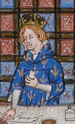 Louis II de France, Louis the Stammerer